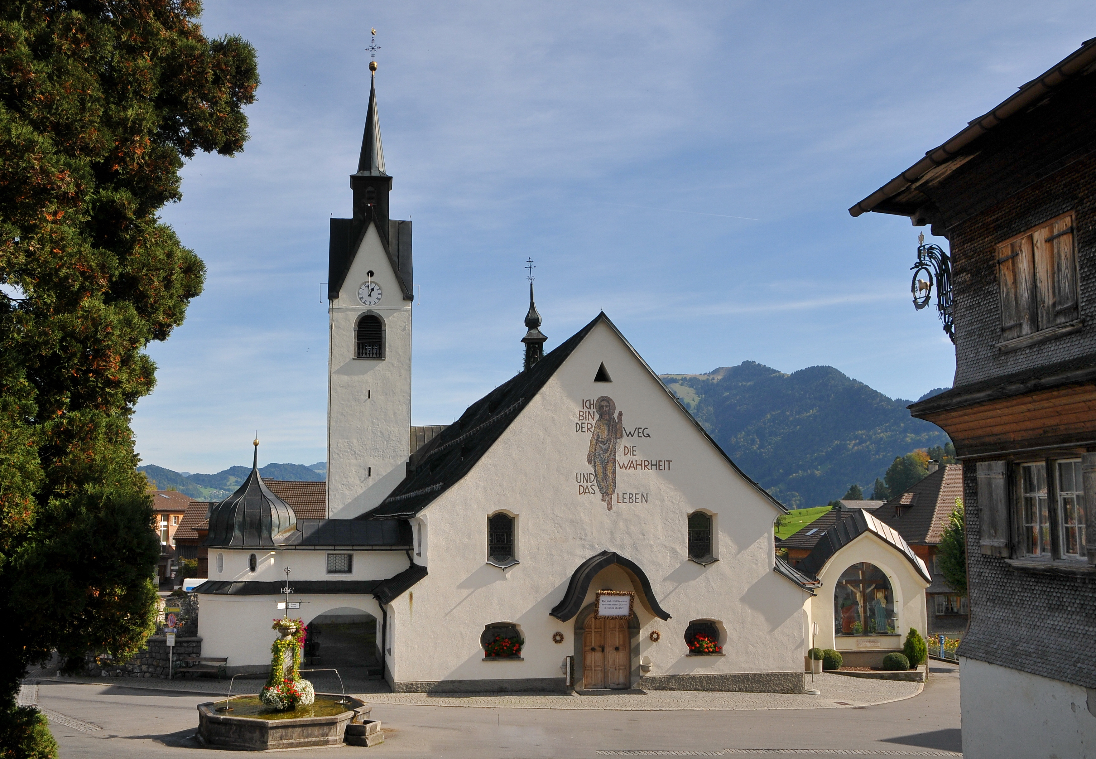 Pfarrkirche Heiligste Dreifaltigkeit von Schwarzenberg in Vorarlberg.